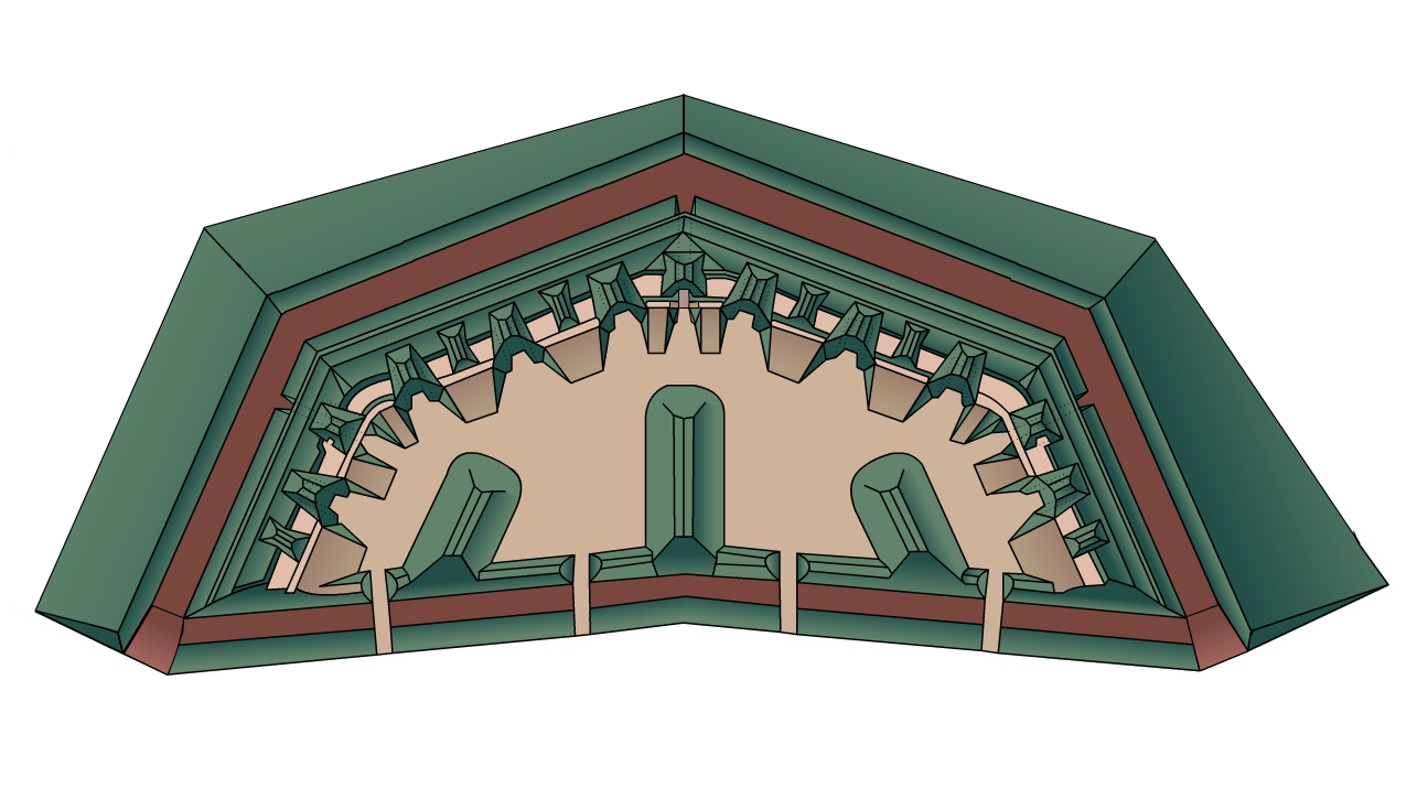 Земляной профиль форта III Брест-Литовской крепости (1877).